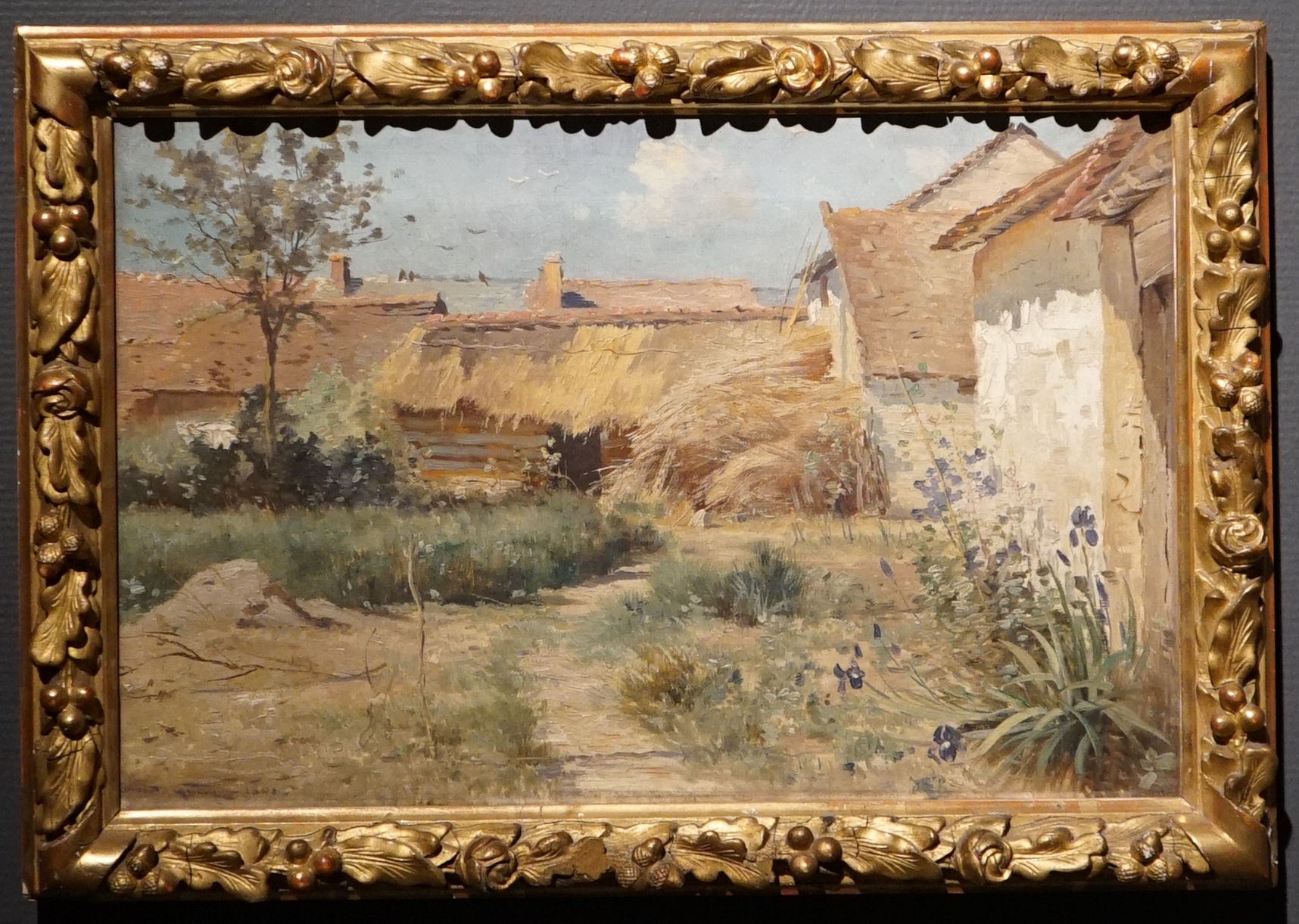 au musée st-Denis de Reims lors de la Nuit des Musées à Reims en 2019.